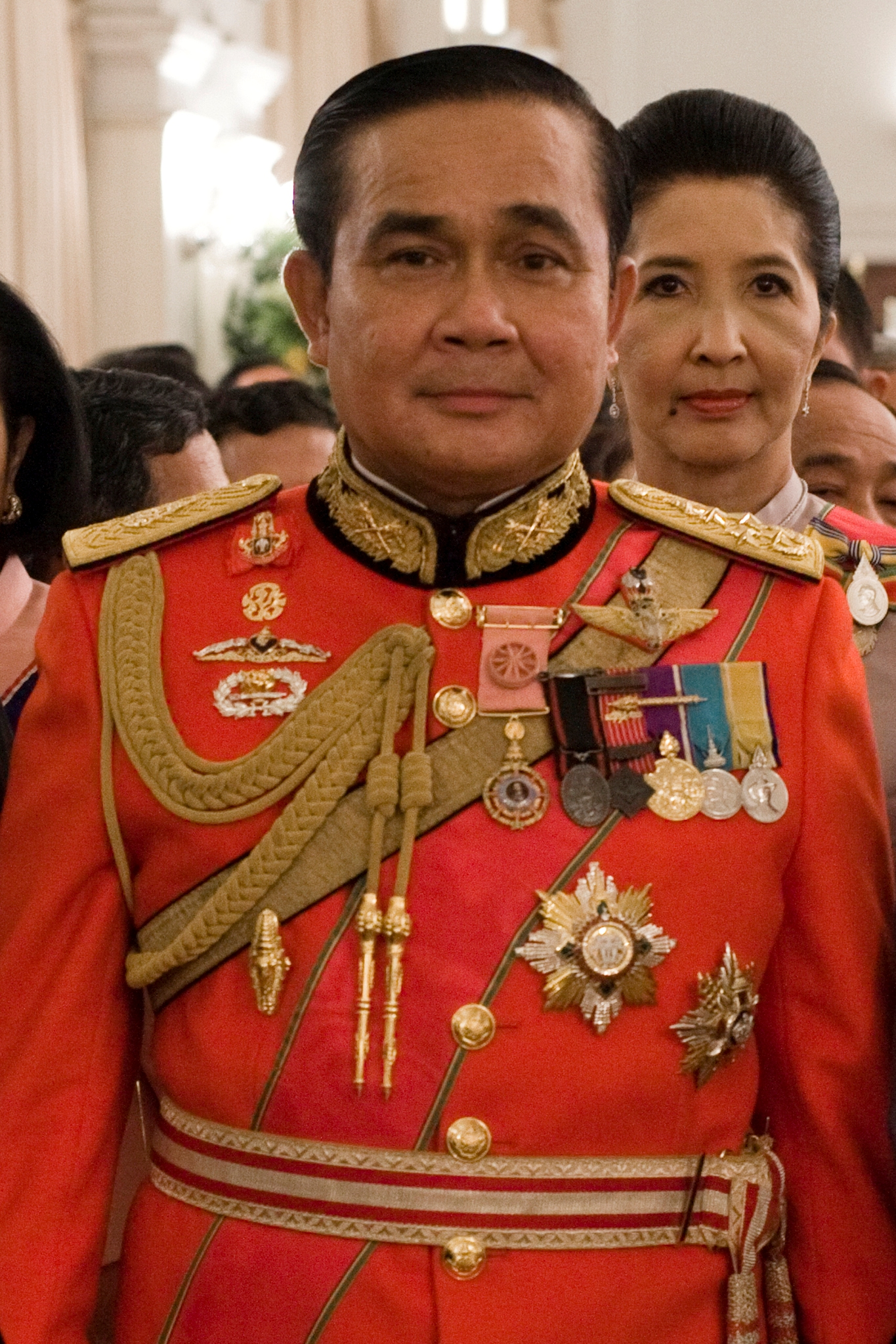 พลเอกประยุทธ์ จันทร์โอชา ผู้บัญชาการทหารบก แต่งกายด้วยเครื่องแบบเต็มยศทหารรักษาพระองค์ สังกัดกรมทหารราบที่ 1 มหาดเล็กรักษาพระองค์ ในพระบาทสมเด็จพระจุลจอมเกล้าเจ้าอยู่หัว ในสโมสรสันนิบาตเฉลิมพระเกียรติพระบาทสมเด็จพระเจ้าอยู่หัว เนื่องในโอกาสวันฉัตรมงคล ณ ตึกสันติไมตรีหลังนอก ทำเนียบรัฐบาล วันพฤหัสบดีที่ 5 พฤษภาคม พ.ศ. 2554